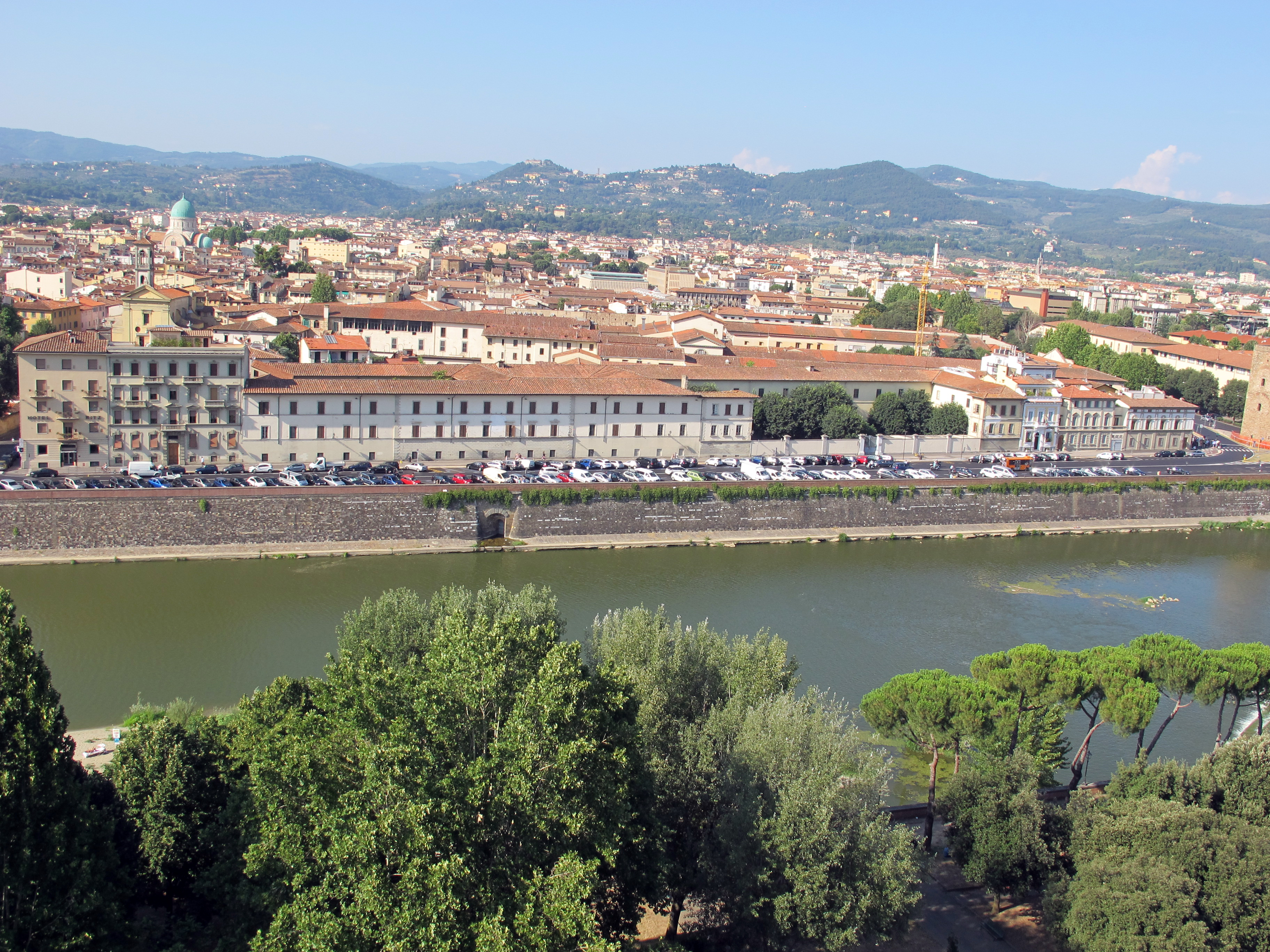 Torre di san niccolò veduta firenze 05 San Girolamo delle Poverine Ingesuate